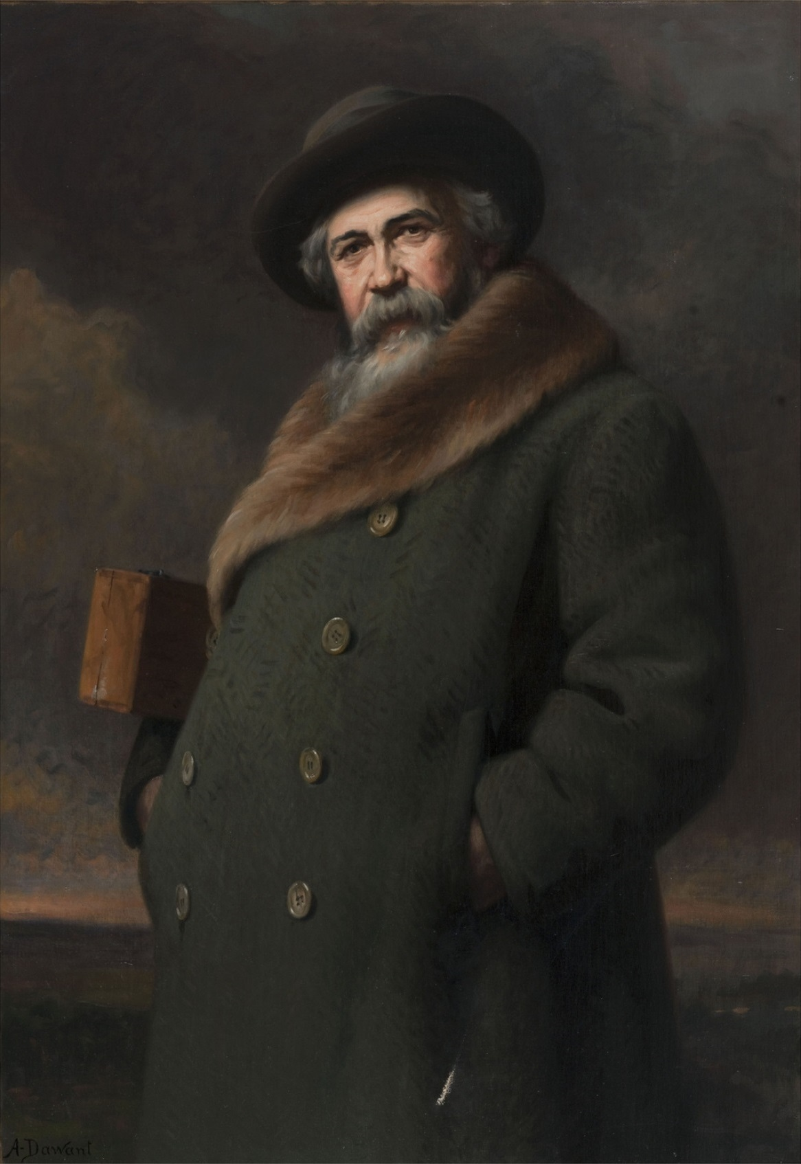 Portrait d'Adrien Demont (1851-1928), peintre françaisPortrait of French painter, Adrien Demontlabel QS:Lfr,"Portrait d'Adrien Demont (1851-1928), peintre français"label QS:Len,"Portrait of French painter, Adrien Demont"